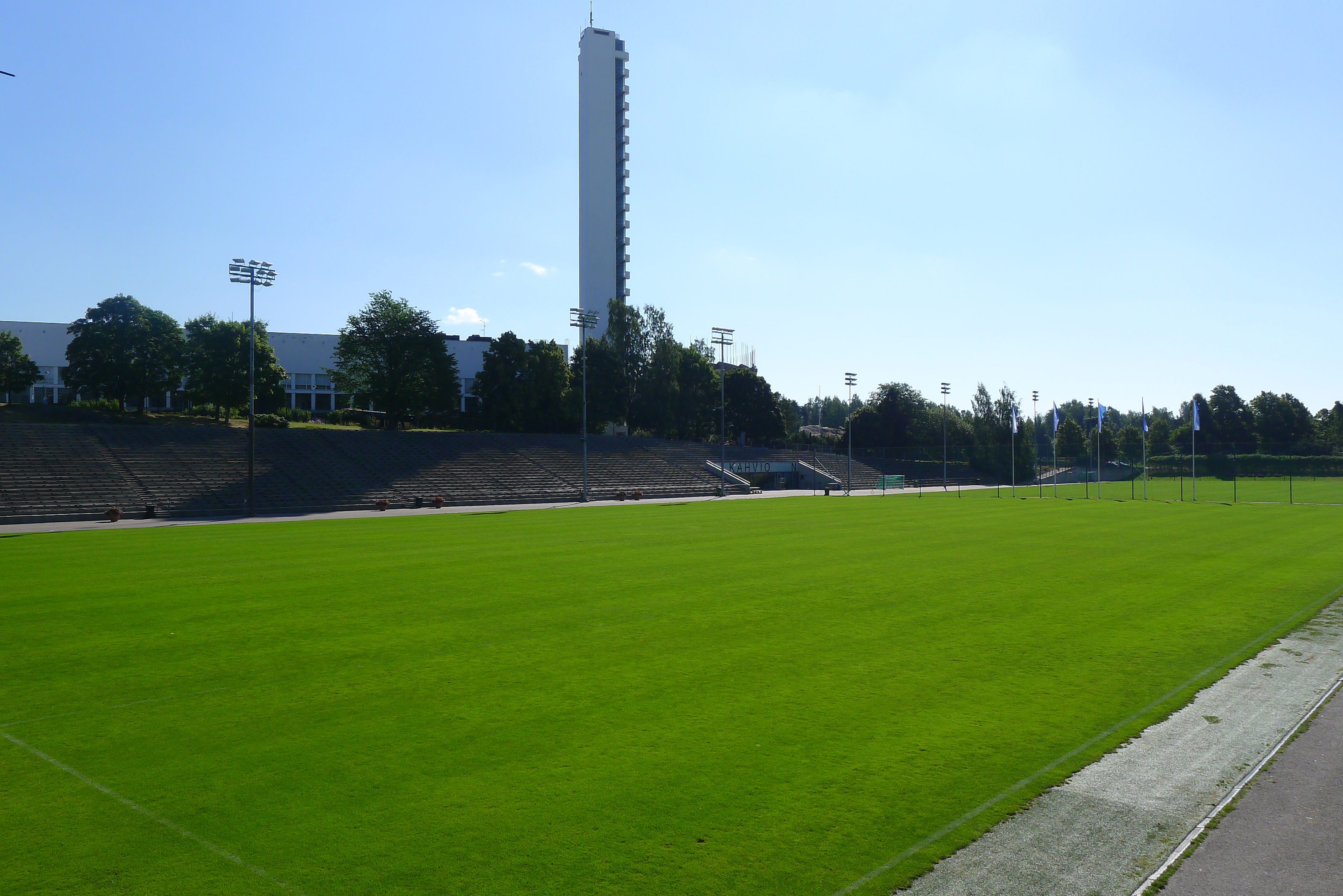 Töölön pallokenttä